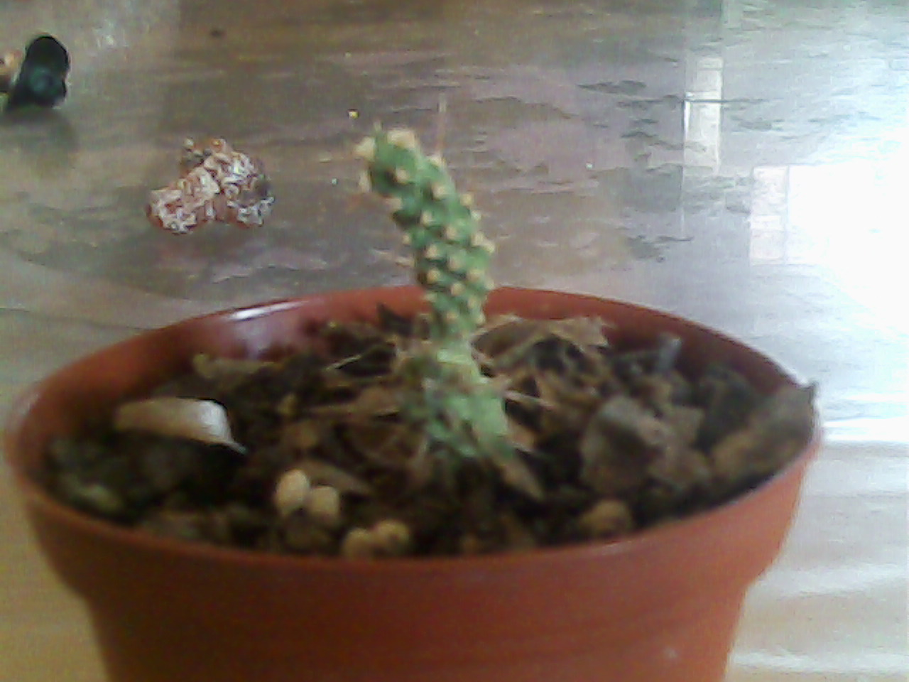 Template:Tunilla corrugata image